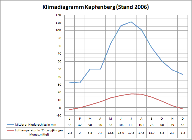 Klimadaten (Lufttemperatur und Niederschlagsmenge; Quelle